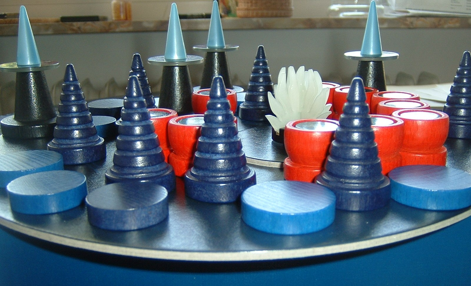 board game Nacht der Magier, Material und Spielplanausschnitt